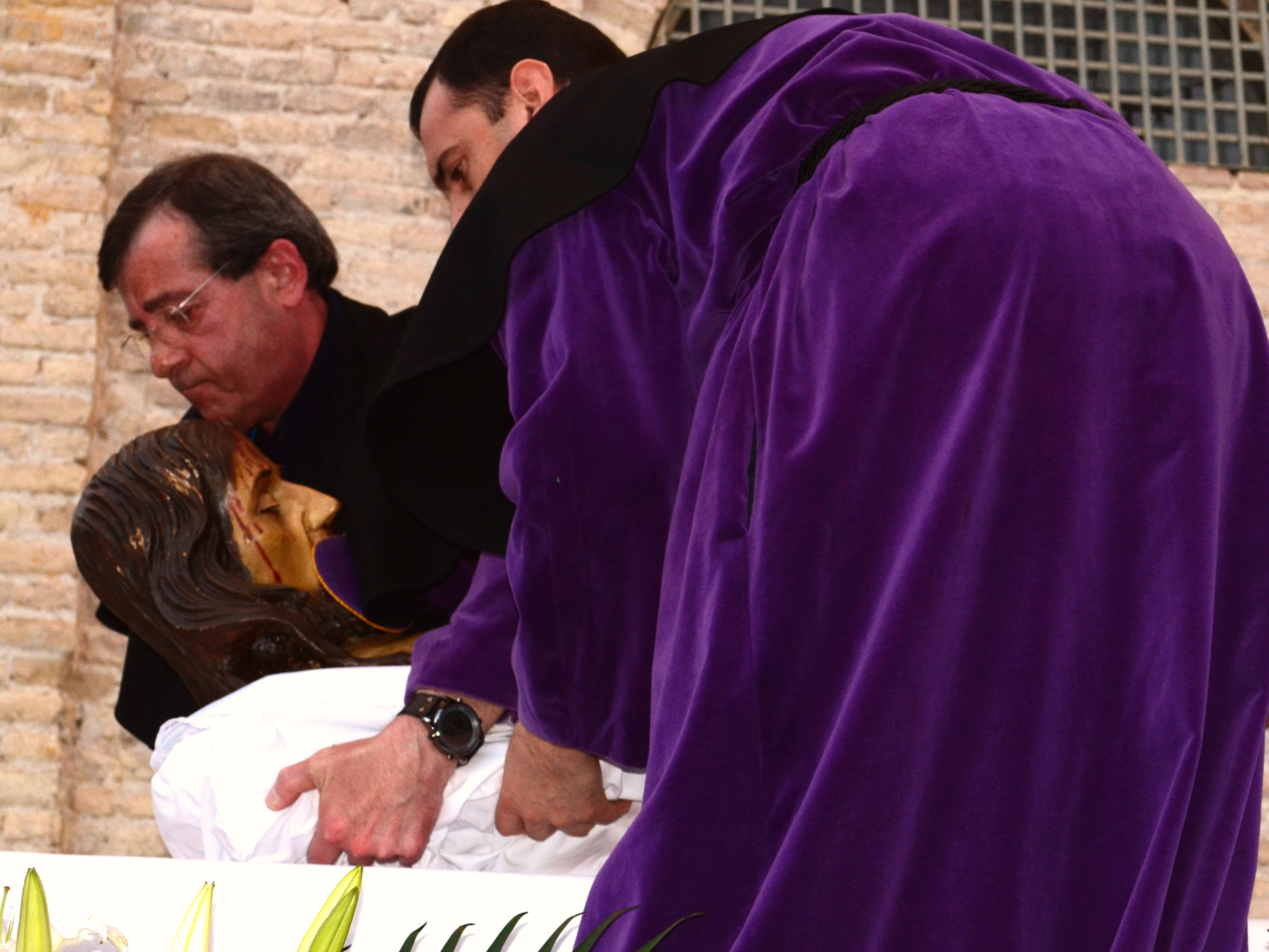 Imagen del Desenclavamiento de Archena